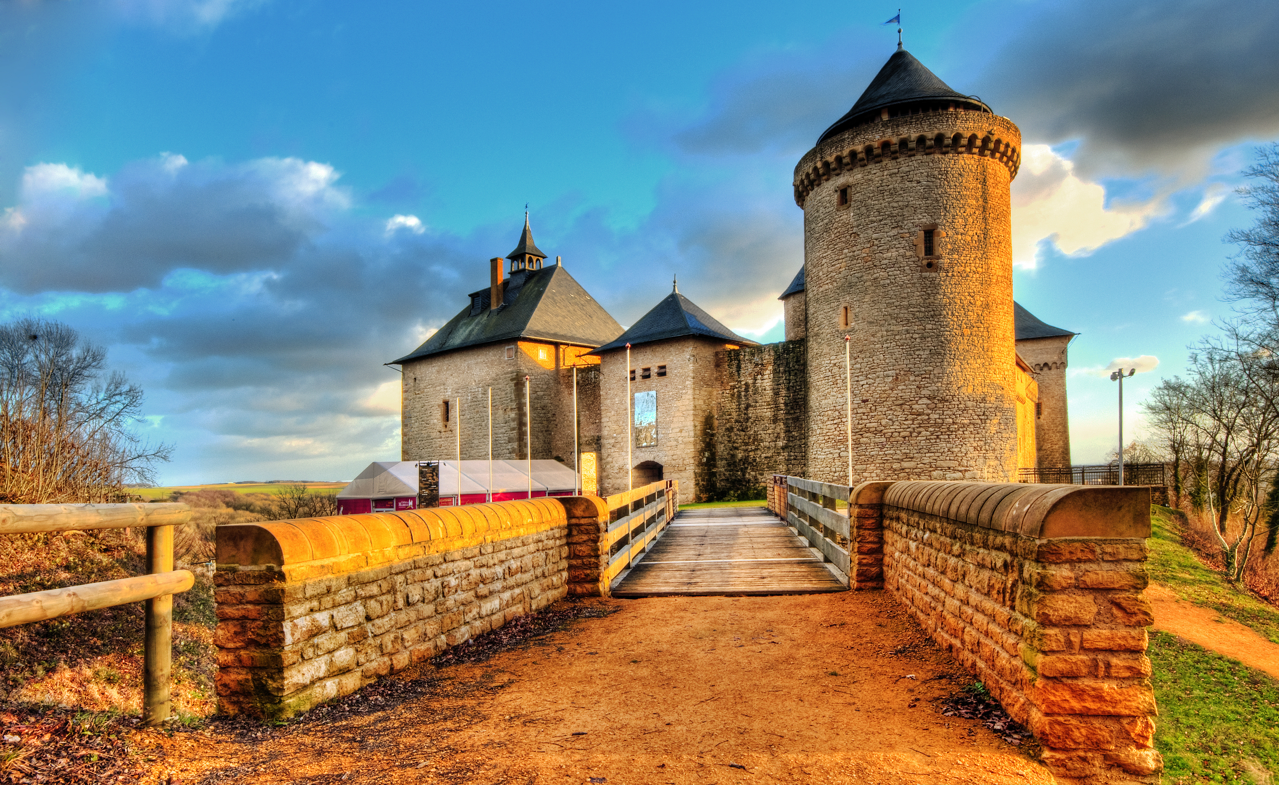 Le château de Malbrouck se situe dans la commune de Manderen en Moselle. Le château est construit par la volonté d'Arnold VI seigneur de Sierck en 1419 et achevé en 1434, année où le château est déclaré en mesure de soutenir un siège, et mis au service de l'archevêché de Trèves.